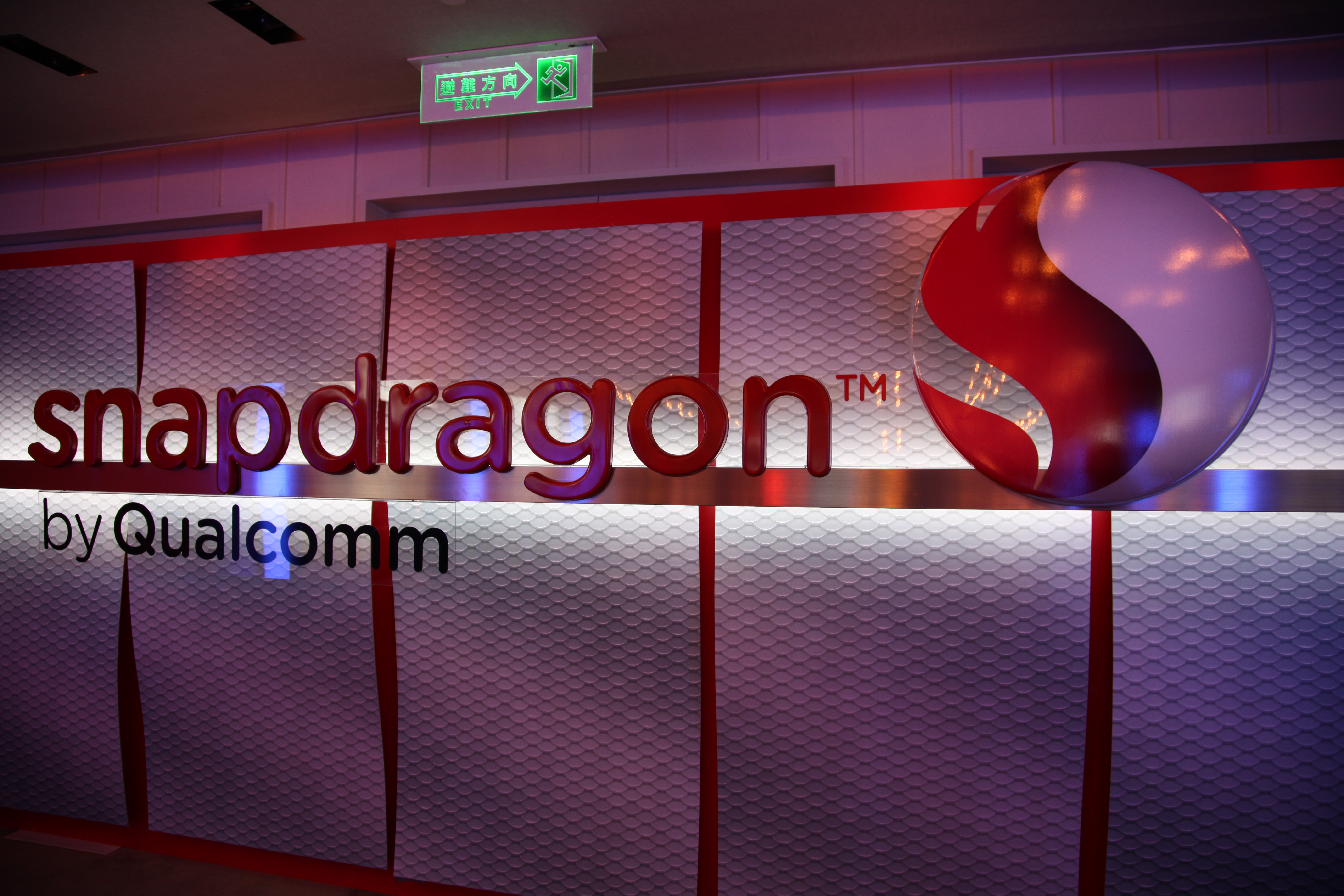 2011台北國際電腦展，高通驍龍標誌。